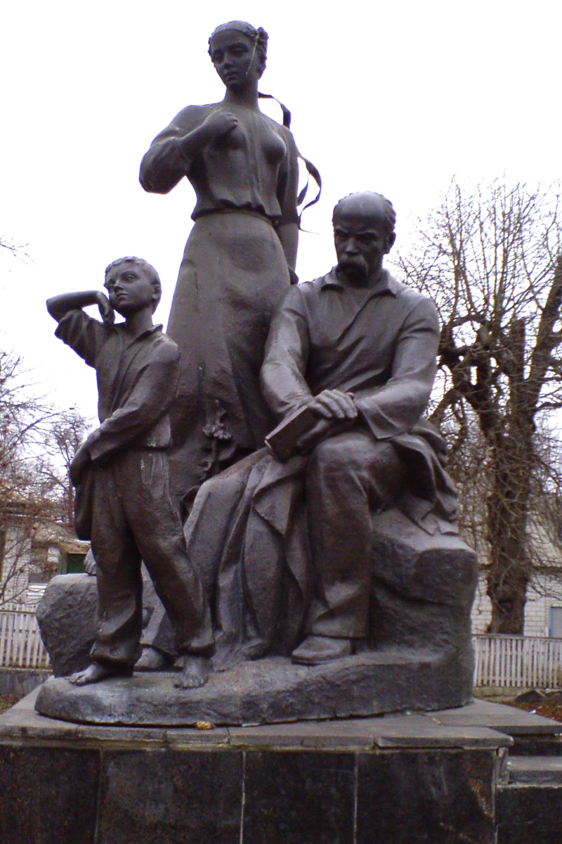 Памятник Тарасу Григоровичу Шевченко в пгт Кирнасовка, Тульчинский район Винницкой области Украины